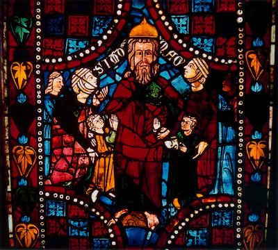 Vidriera de Simón el Mago, catedral de León